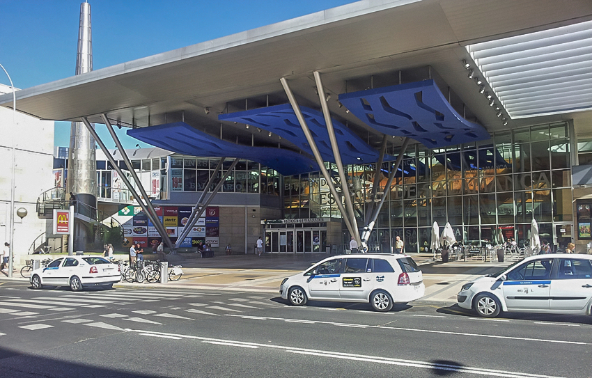 Estación de Salamanca.